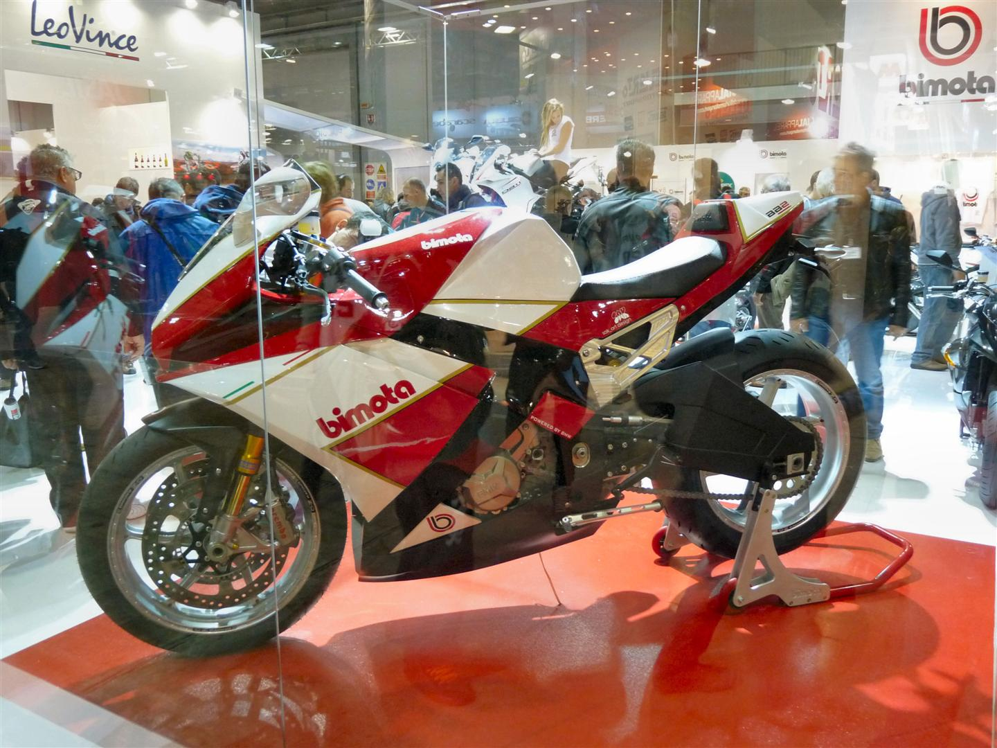 Bimota BB2 sur le stand Bimota lors de l'EICMA 2012